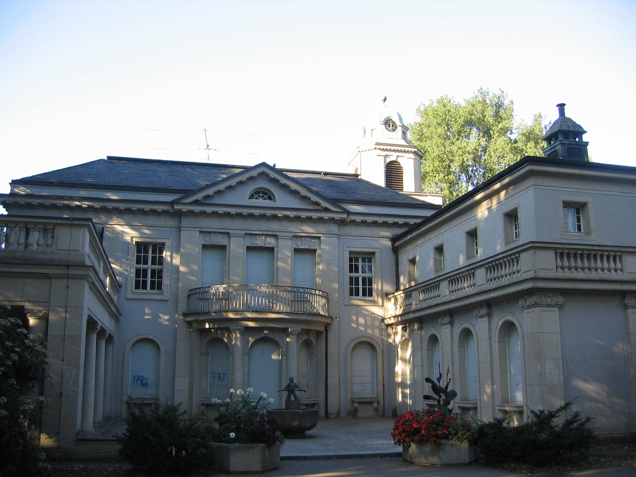 Haus Schulte-Witten in Dortmund Dorstfeld Eigene Aufnahme September 2006